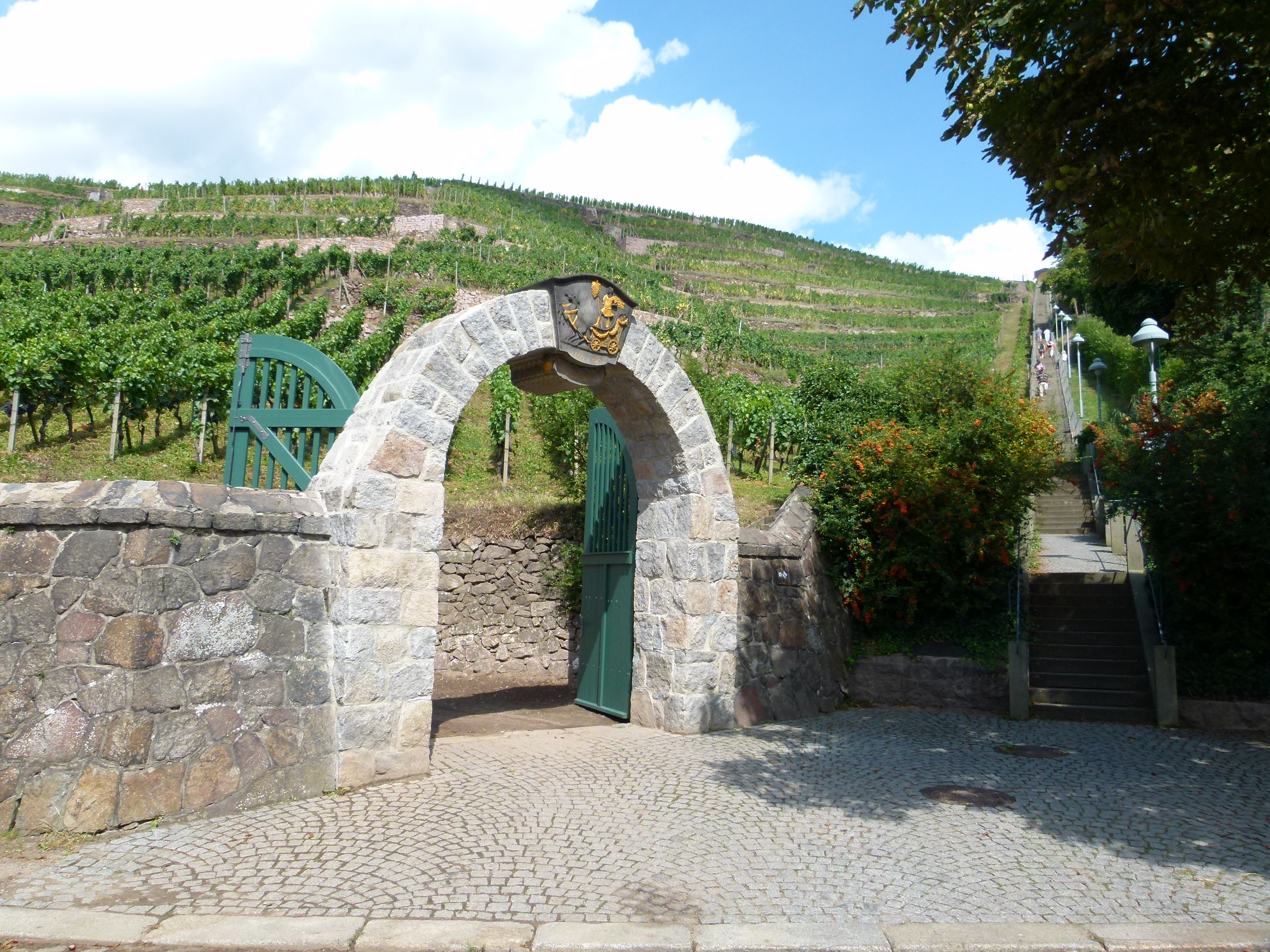 Denkmalgeschützte Spitzhaustreppe sowie Tor Goldener Wagen, Radebeul, Sachsen